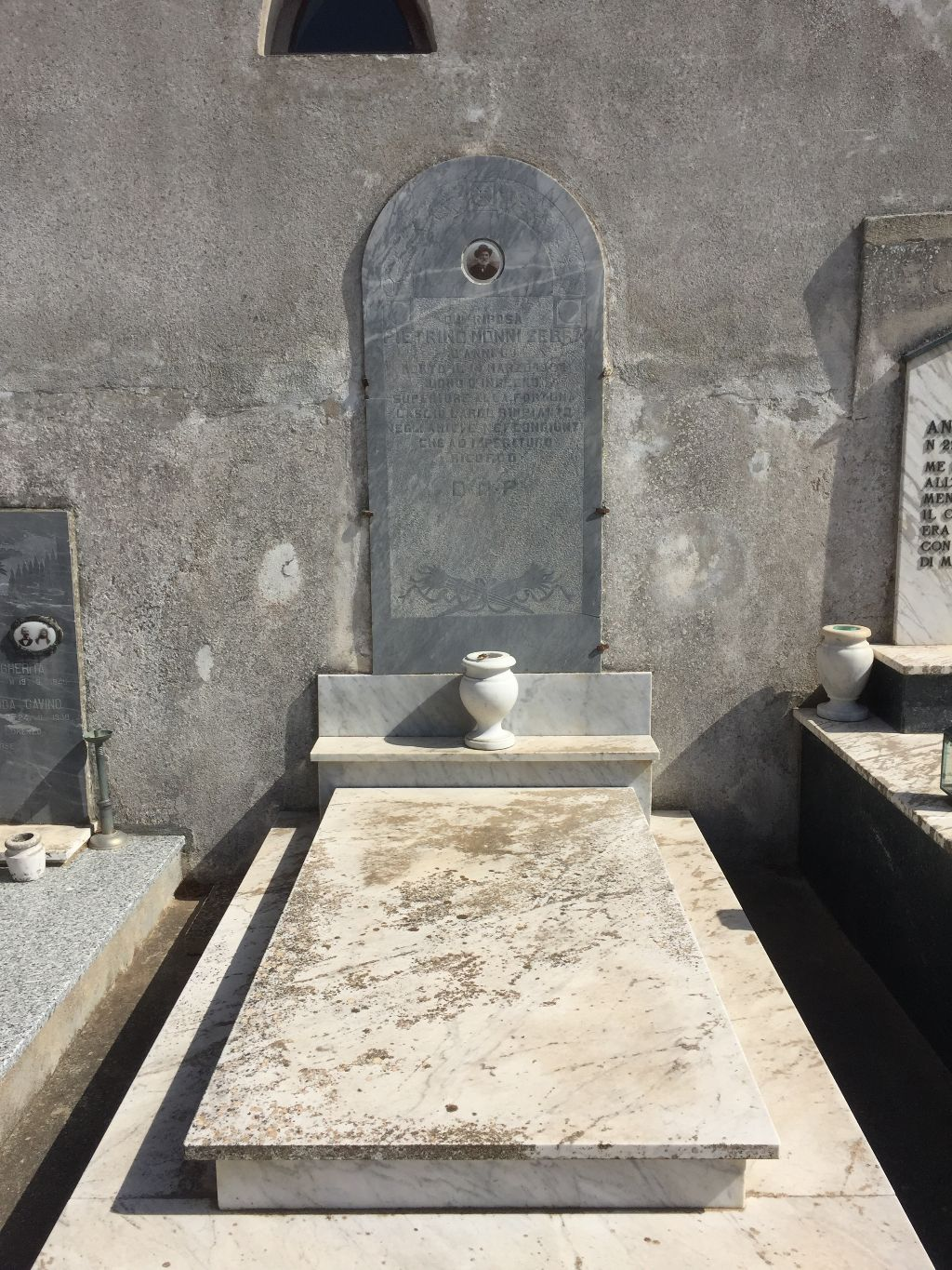 Toba Pietrino Monni-Serra